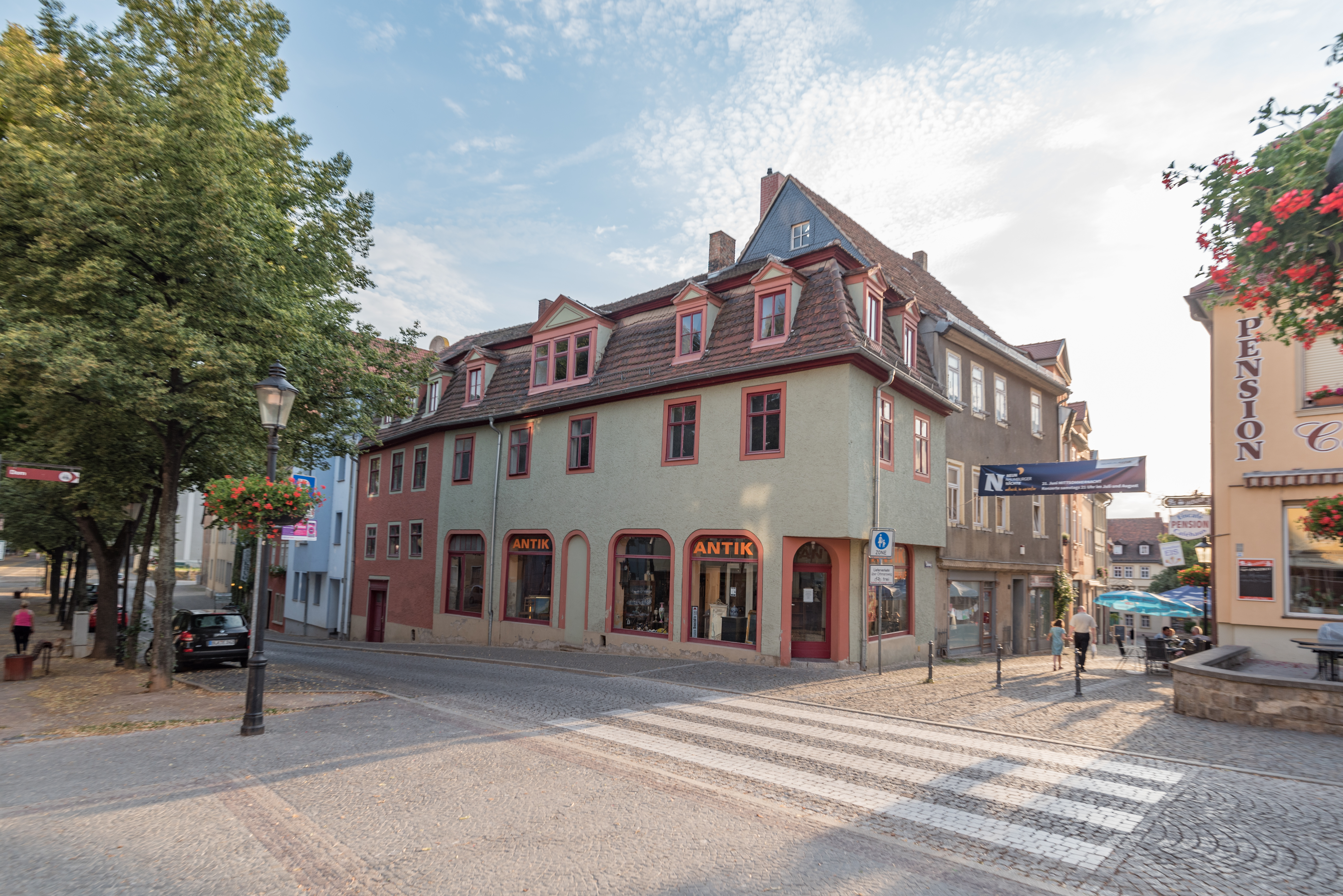 Naumburg (Saale), Lindenring 41